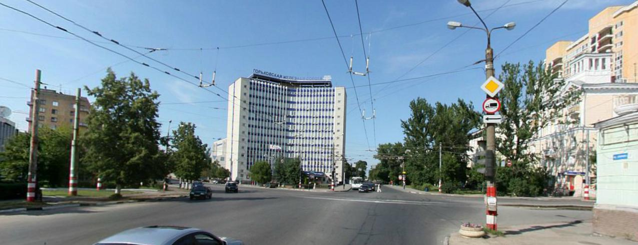 Площадь Железнодорожников в Нижнем Новгороде